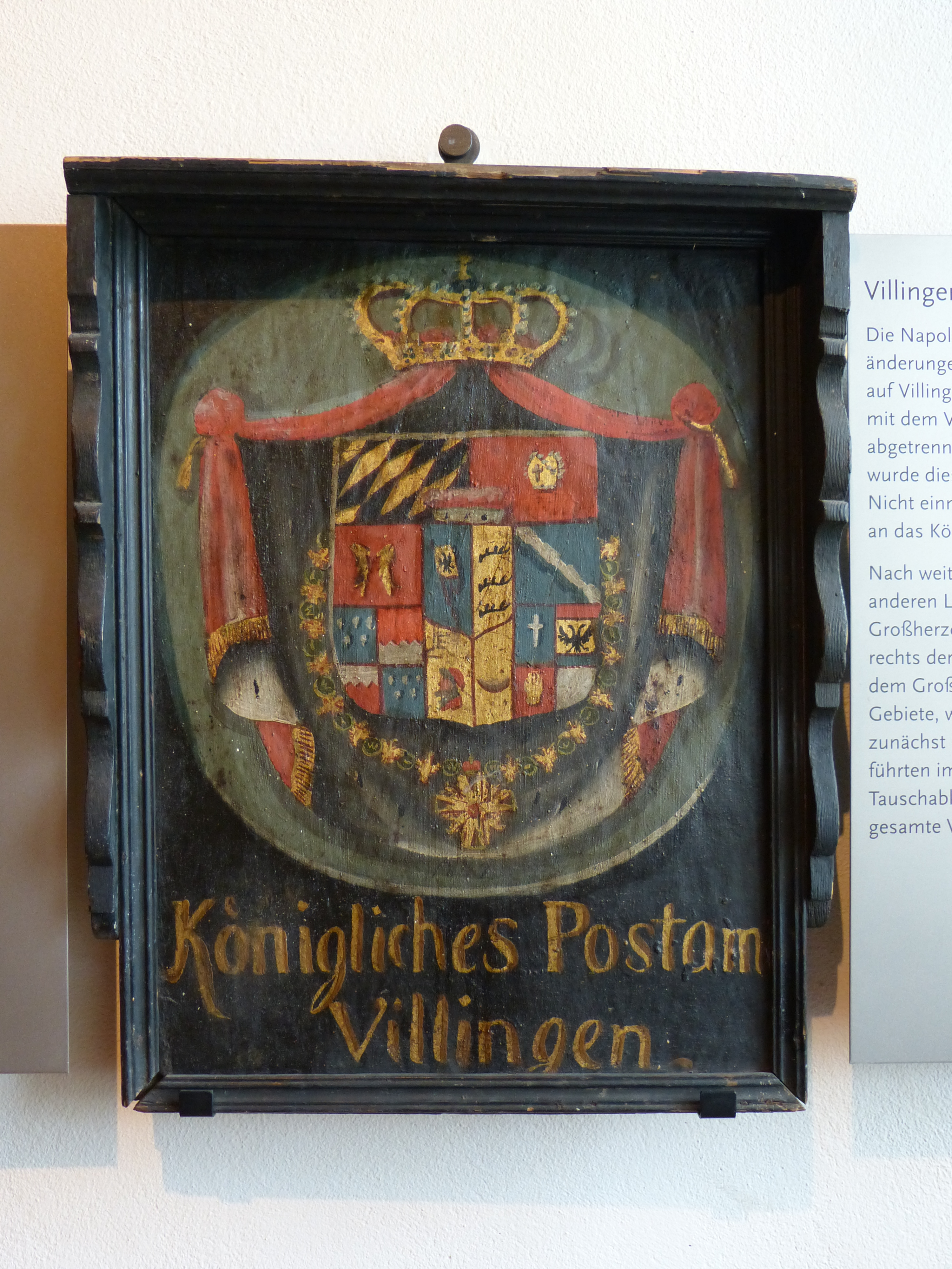 Franziskanermuseum Villingen, Baden-Württemberg Württembergisches Postwappen, 1806, Holz bemalt Auf der Tafel ist das Wappen des Königs von Württemberg dargestellt. Es trägt die Unterschrift "Königliches Postamt Villingen". Das Postwappen war einige Monate im Jahr 1806 am Oberen Tor angebracht.